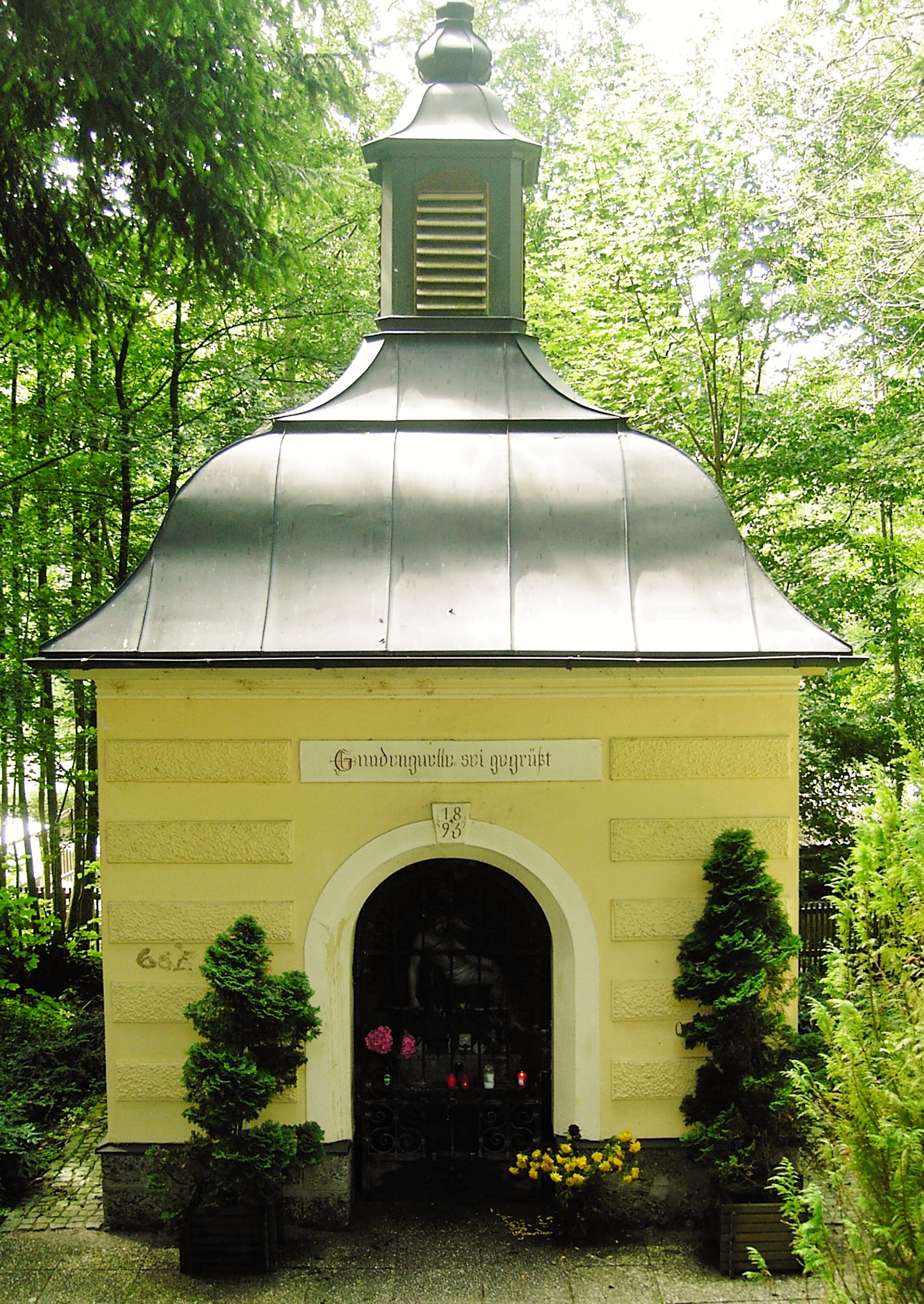 Adlwang Kapelle heiliger Brunnen, Ansicht von Treppenanlage